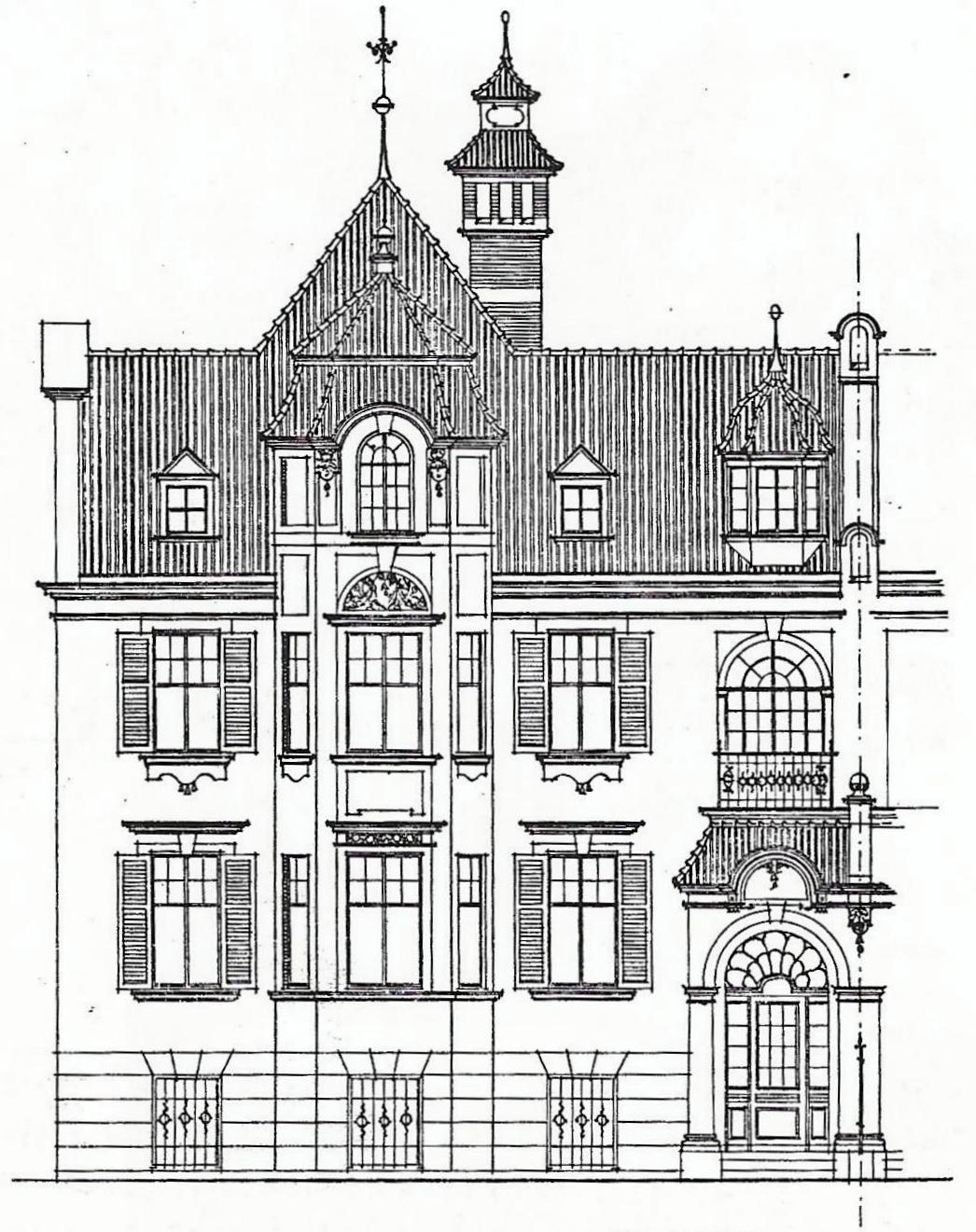 Doppelvilla Finkler, Tempelstraße 1/3, Bonn-Gronau: Aufriss der Straßenfront der Halbvilla Tempelstraße 1